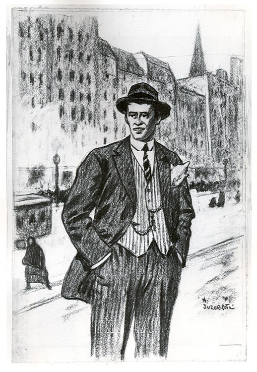 Lorenzo Surprenant, personnage du roman Maria Chapdelaine de Louis Hémon